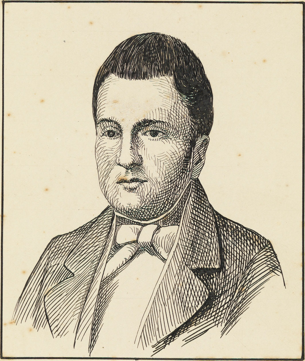 Domingos Martins